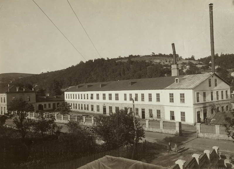 Акционерно анонимно дружество „Успех“. Фабрика „Фердинанд I“ за текстилни произведения в Габрово. Основана в 1887 г. с основен капитал 280 000 лева, с 90 работници. През 1912 г. е с основен капитал 500 000 лева и 190 работници. Фотоалбум с фотографии на български индустриални предприятия от периода 1887-1912 г., подарен от Съюза на българските индустриалци на цар Фердинанд І по случай 25-годишнината от възшествието му на българския престол.